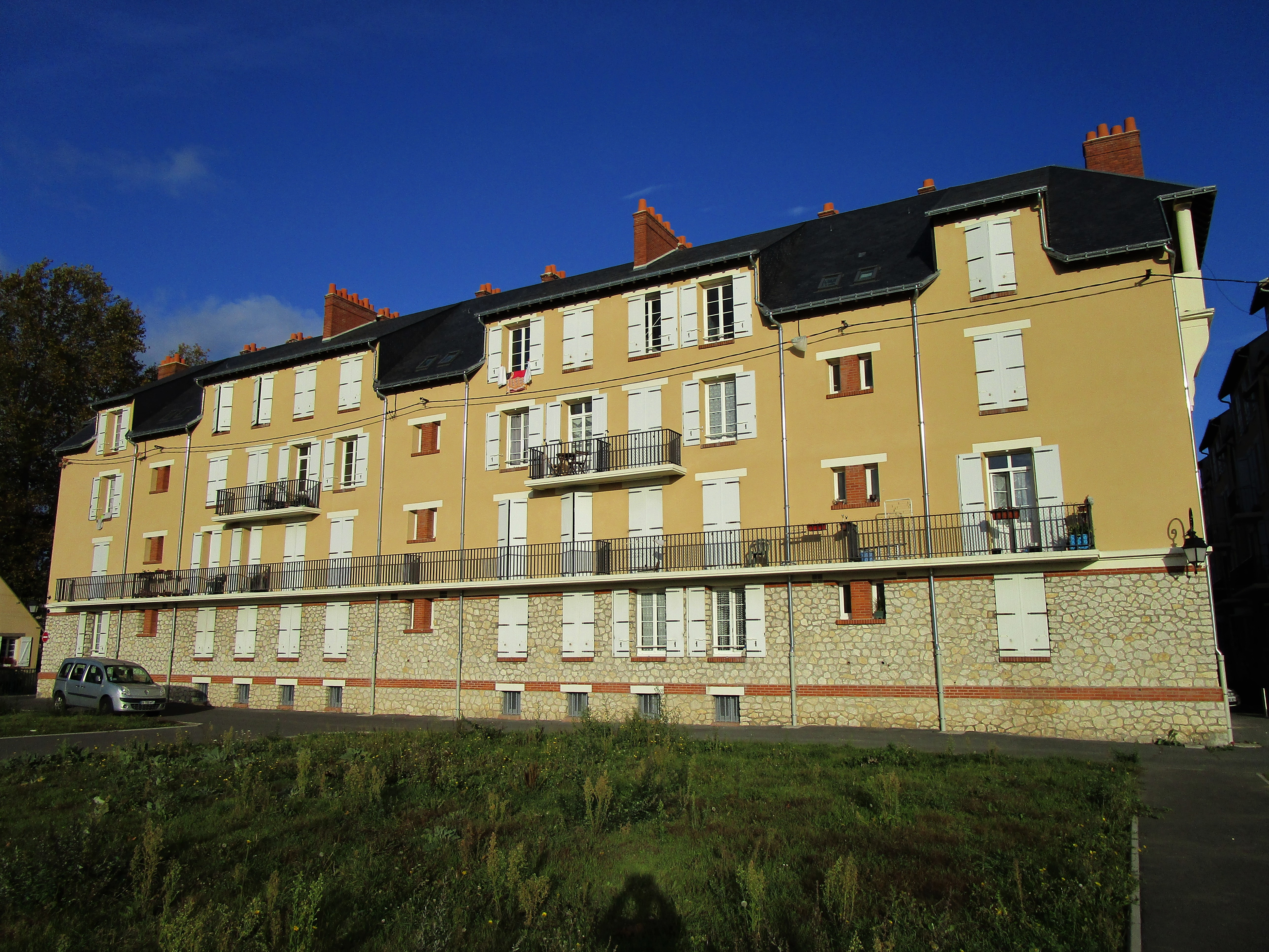 La cité-jardin Bords de Loire dans le quartier Lamartine de Tours.